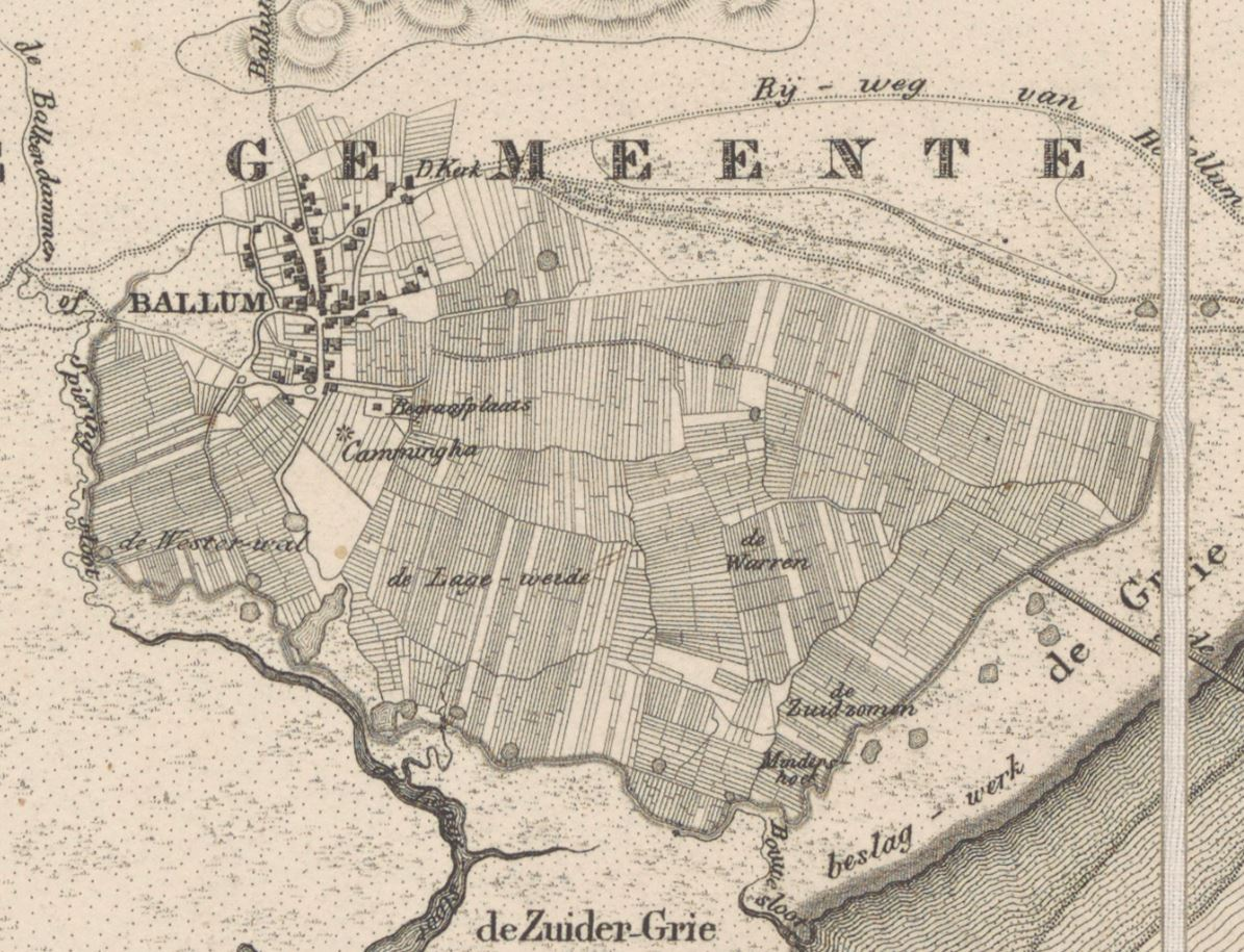 De Ballumermieden in 1854: zeer veel kleine percelen zonder wegen en zonder goede afwatering. De kaart geeft de percelen alleen op hoofdlijnen weer en niet gedetailleerd: in werkelijkheid waren de percelen nog kleiner. De ruilverkaveling van 1915 bracht hier verandering in.